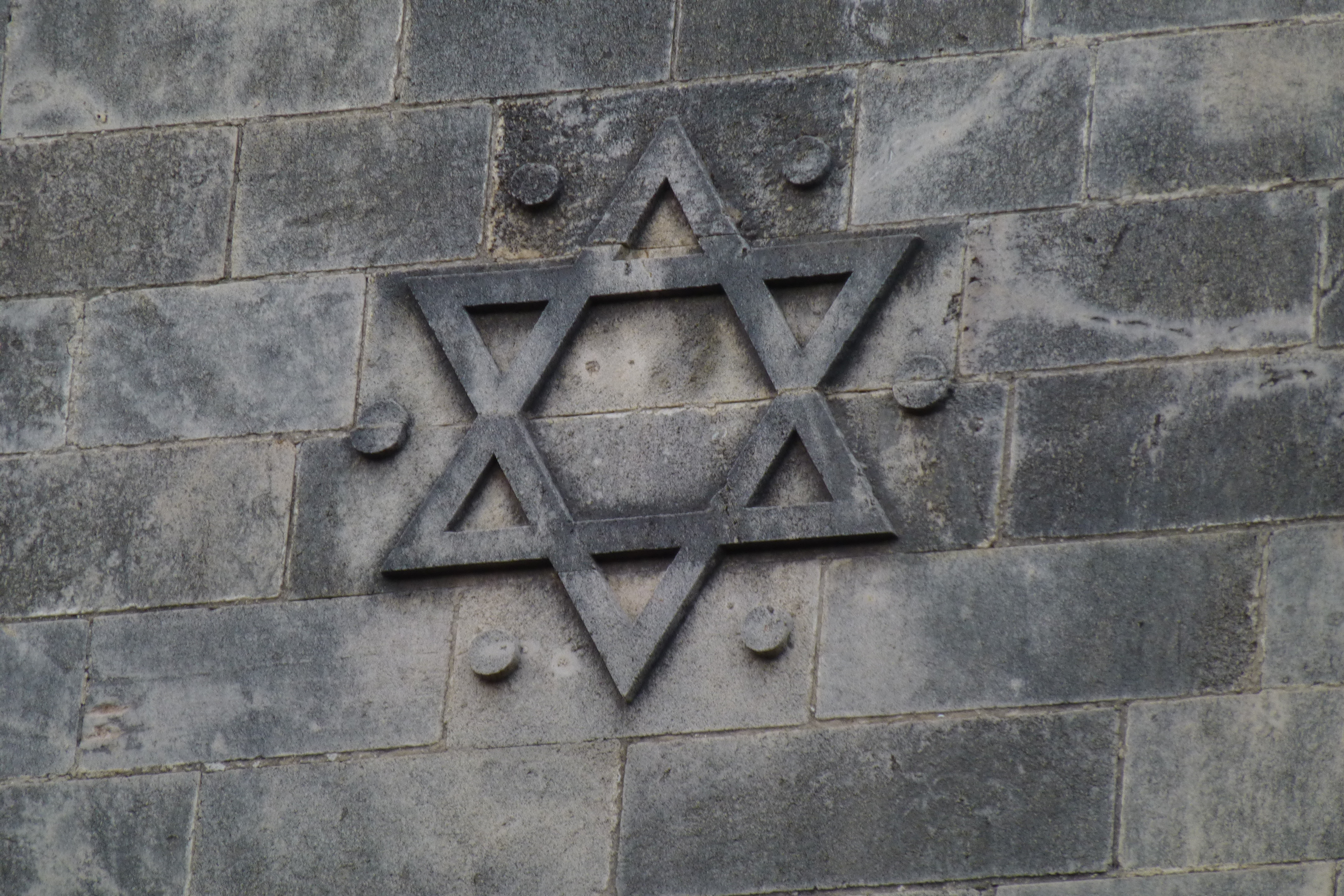 בית הכנסת הגדול של חיפה, רח' הרב הרצוג 5